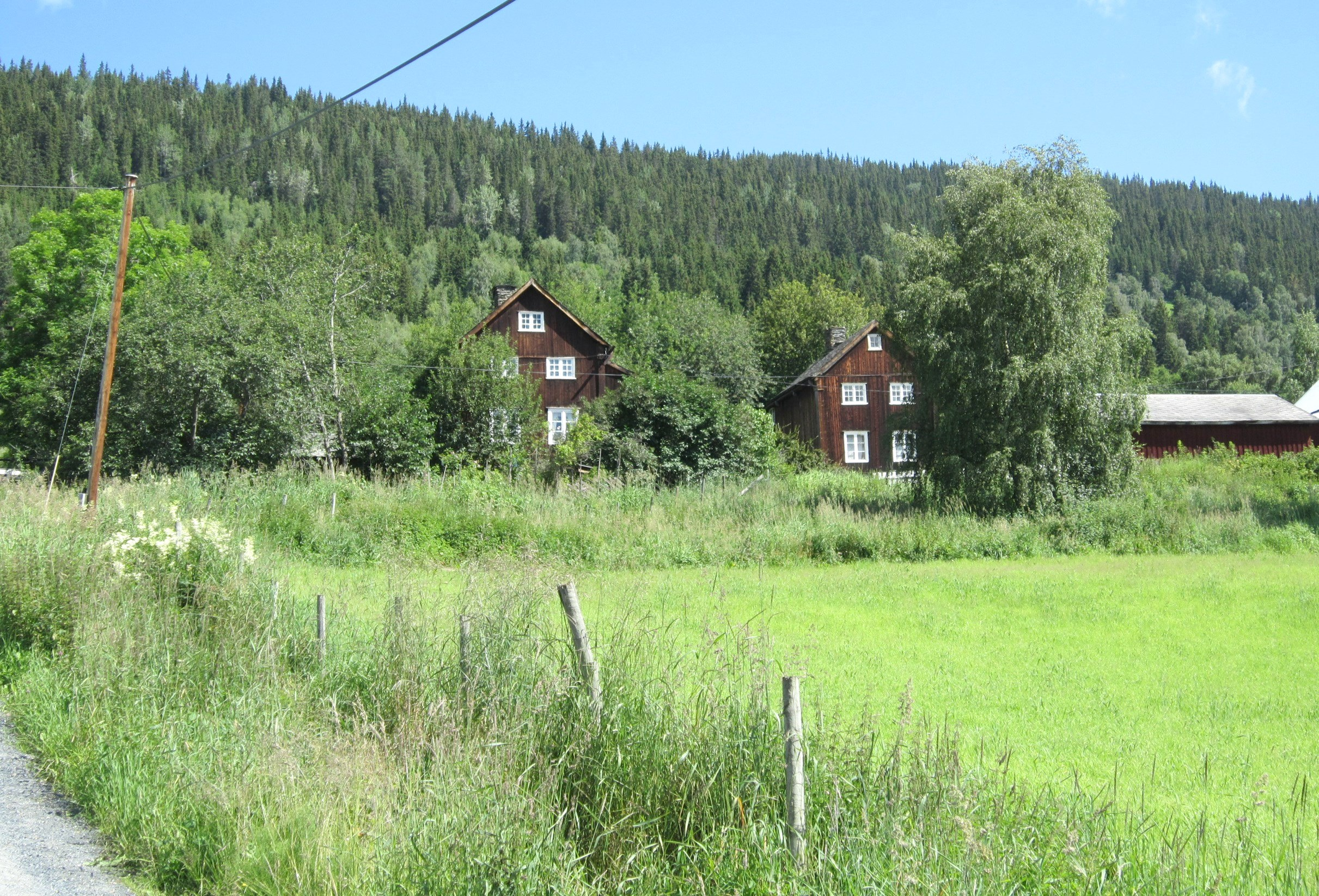 Fra området rundt Lomen stavkirke